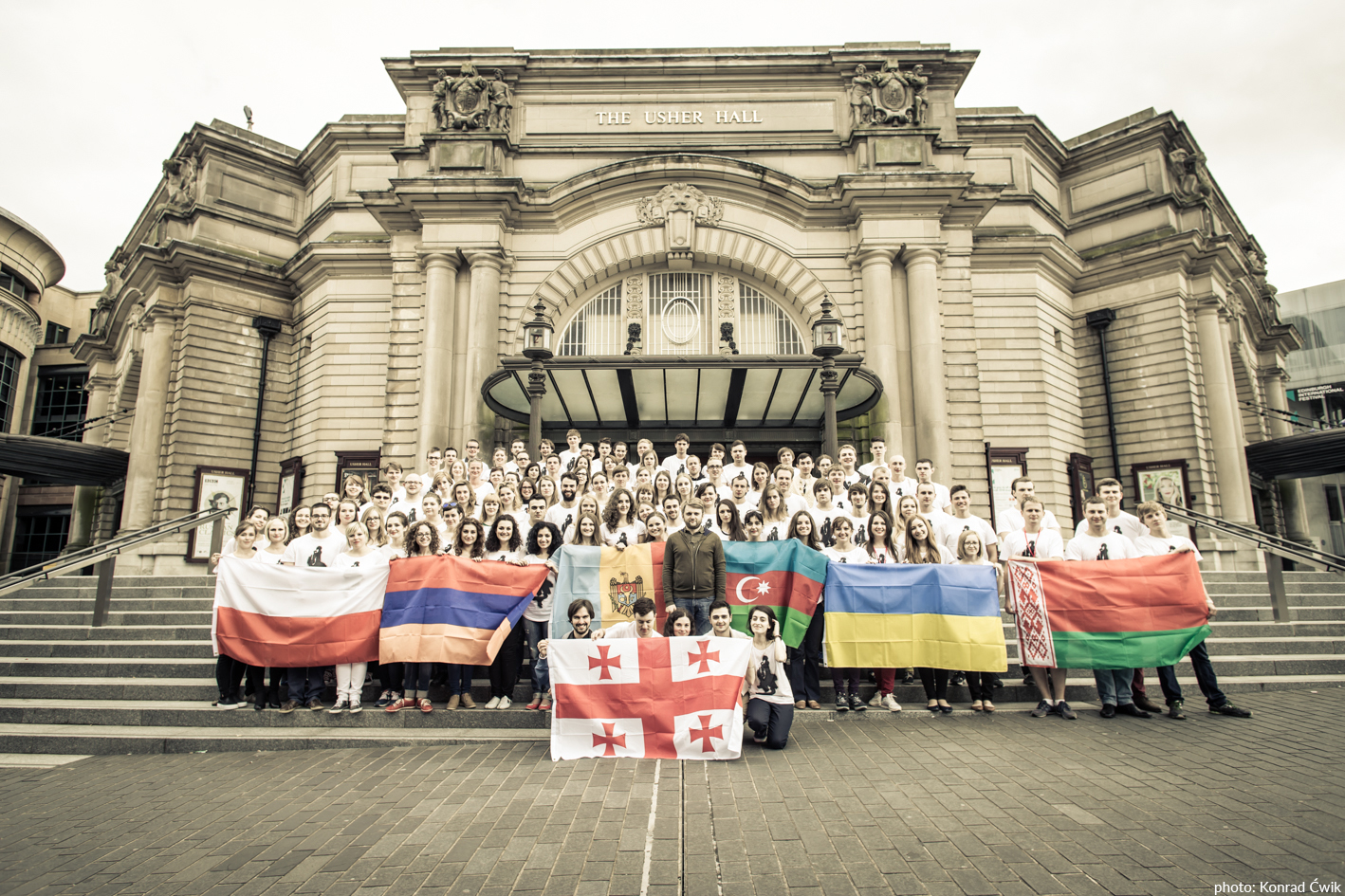 I, CULTURE Orchestra przed salą koncertową the Usher Hall w Edynburgu.